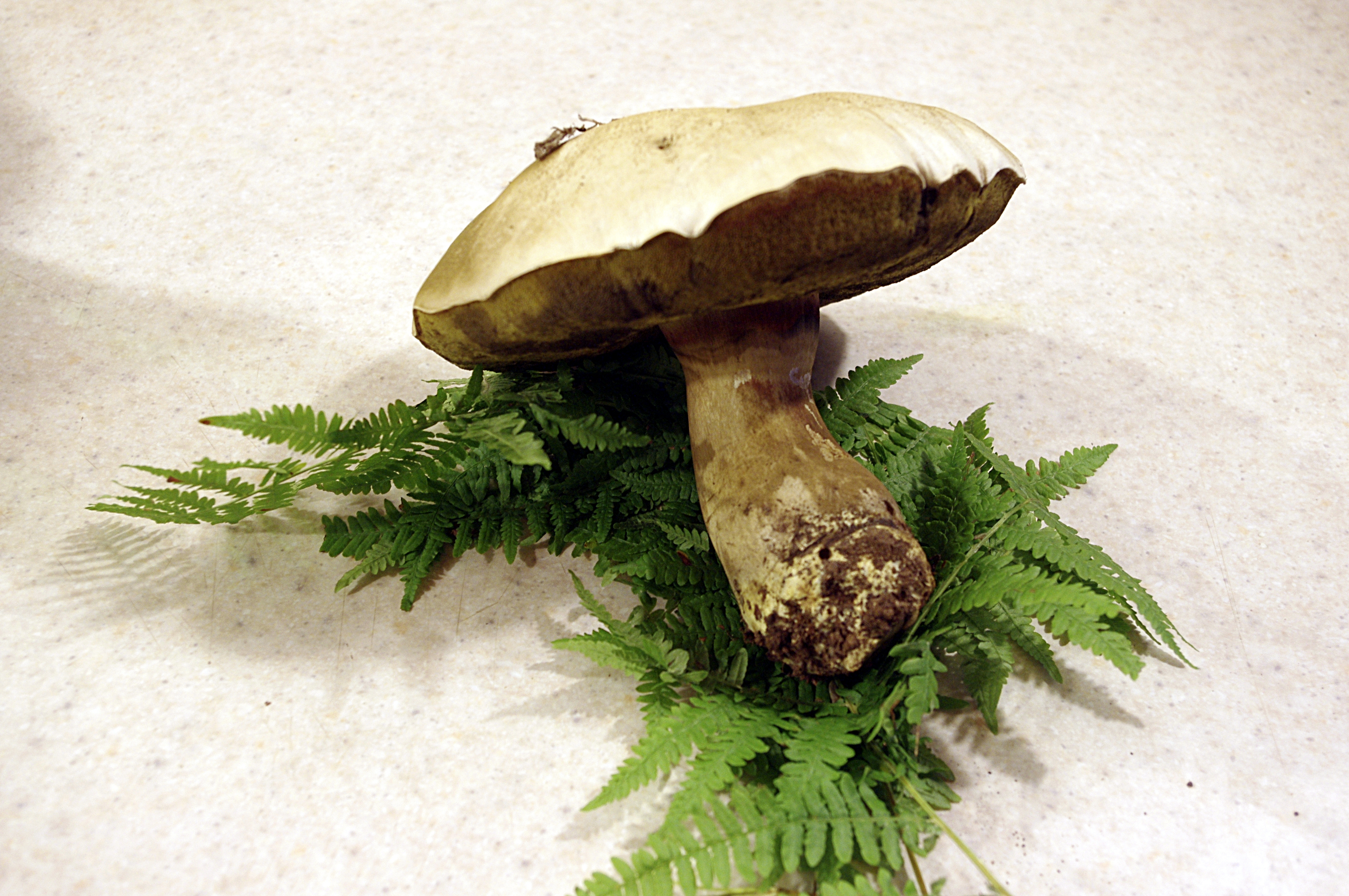 Bolet amer (tylopilus felleus) Dordogne, France